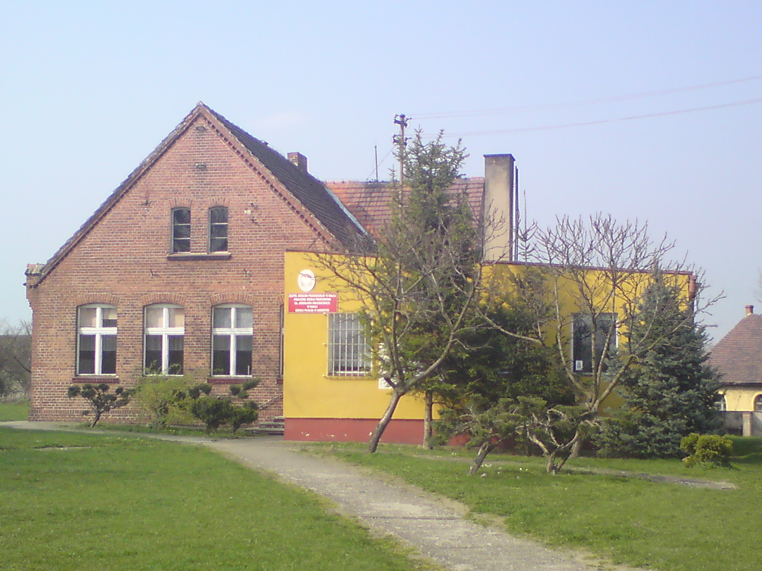 Szkoła wybudowana w XX wieku.